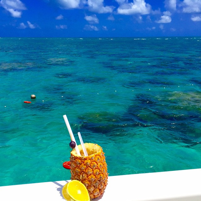 Um paraíso em Maracajaú.